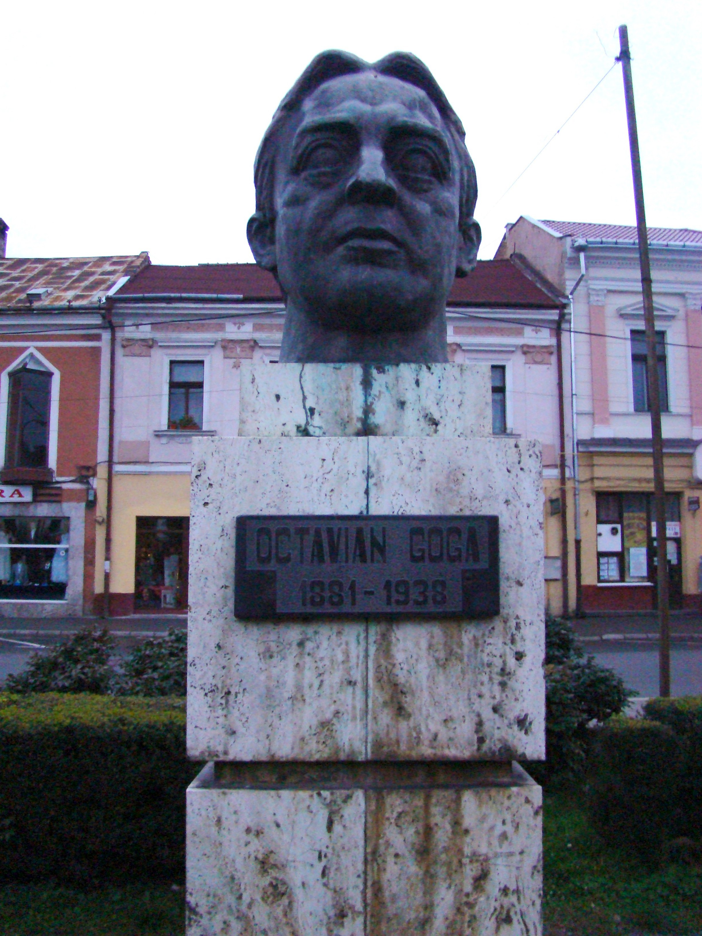 Bustul lui Octavian Goga din Sighet